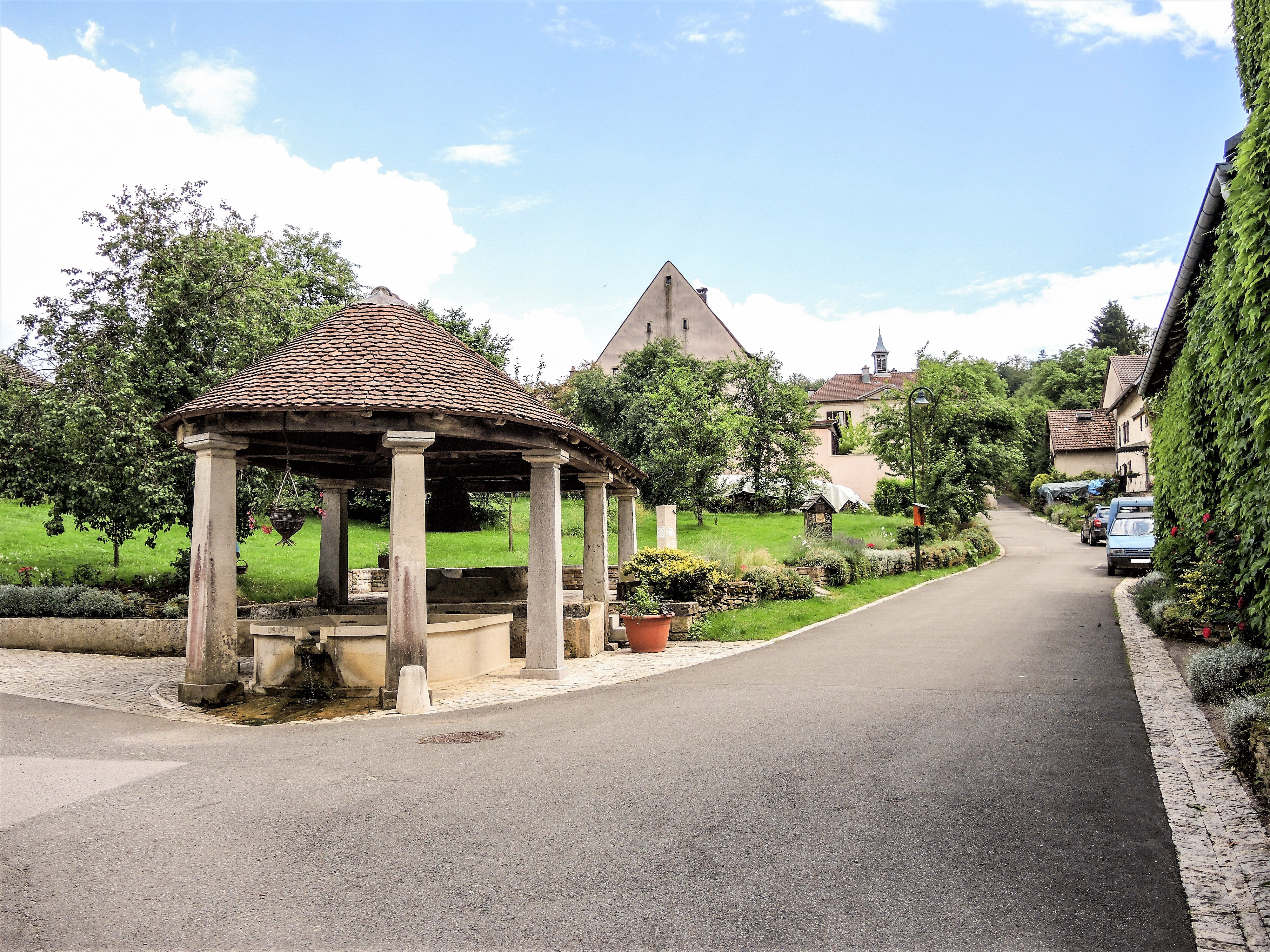 Fontaine-lavoir-abreuvoir, au centre du village de Saint-Julien-Lès-Montbéliard. Doubs